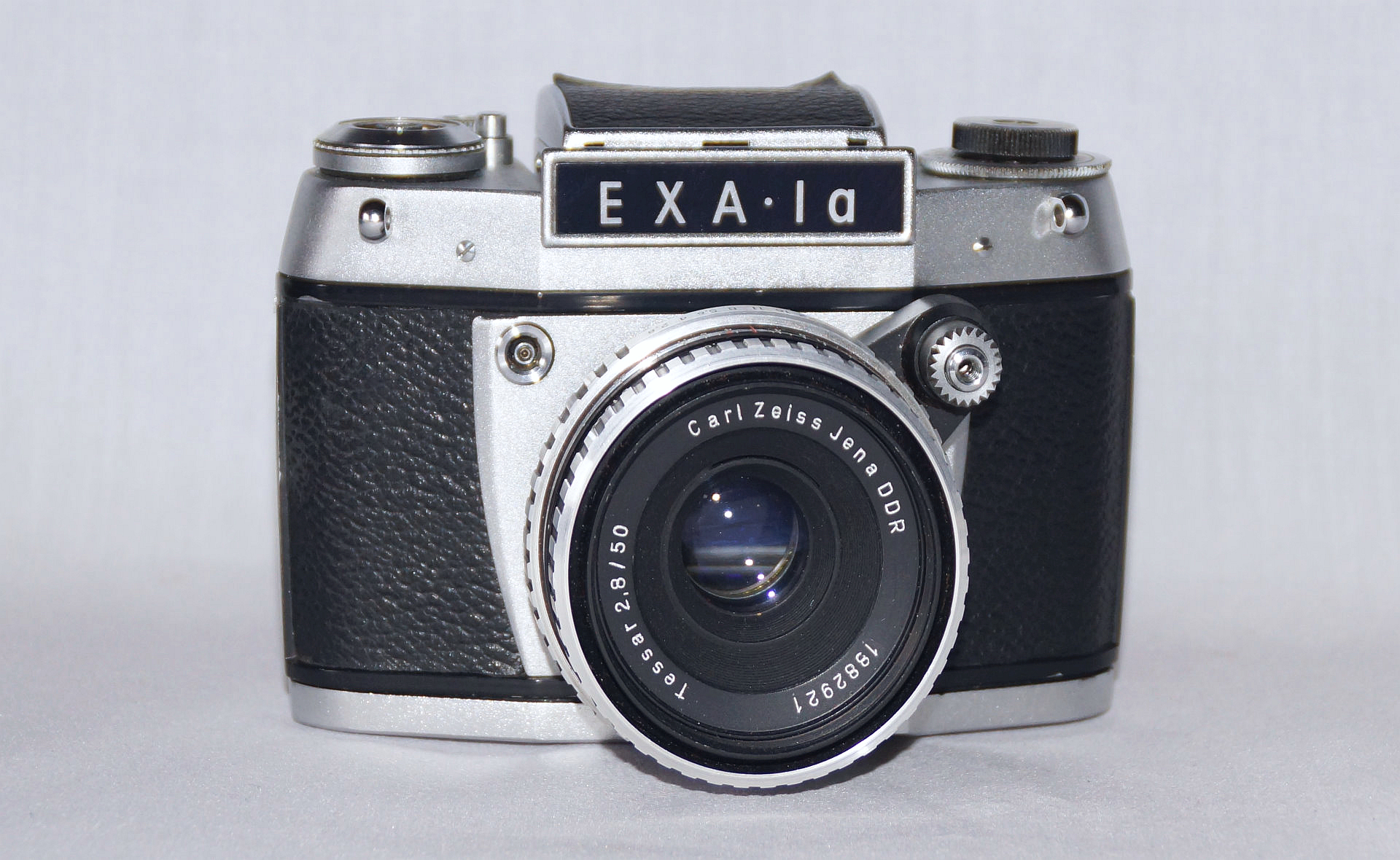 EXA Ia mit Carl Zeiss Tessar 50mm 1-2.8 von Ihagee Dresden - Foto 2019 Wolfgang Pehlemann DSC04883.jpg